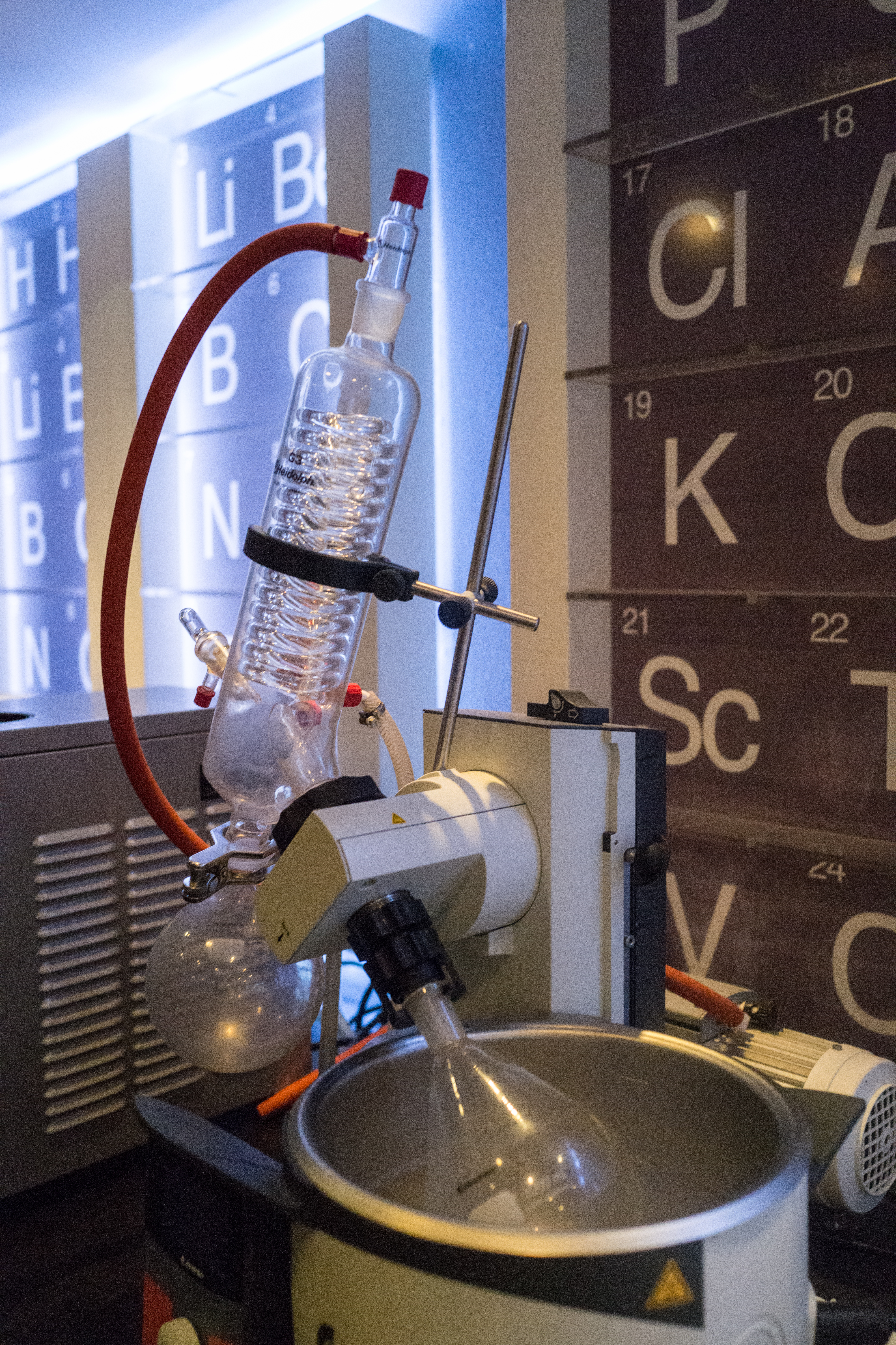 moto Chicago